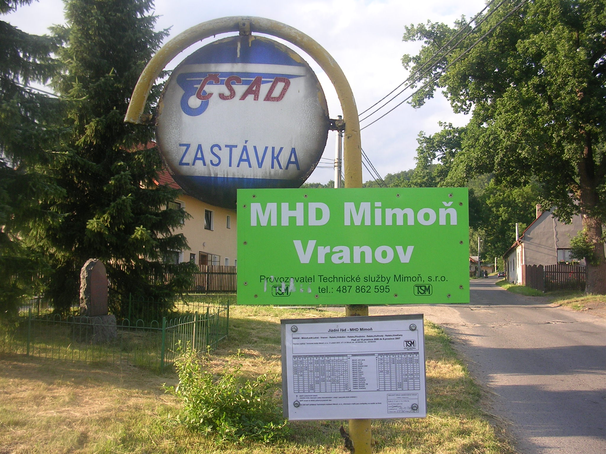 Zastávka městské autobusové linky v Mimoni v místní části Vranov